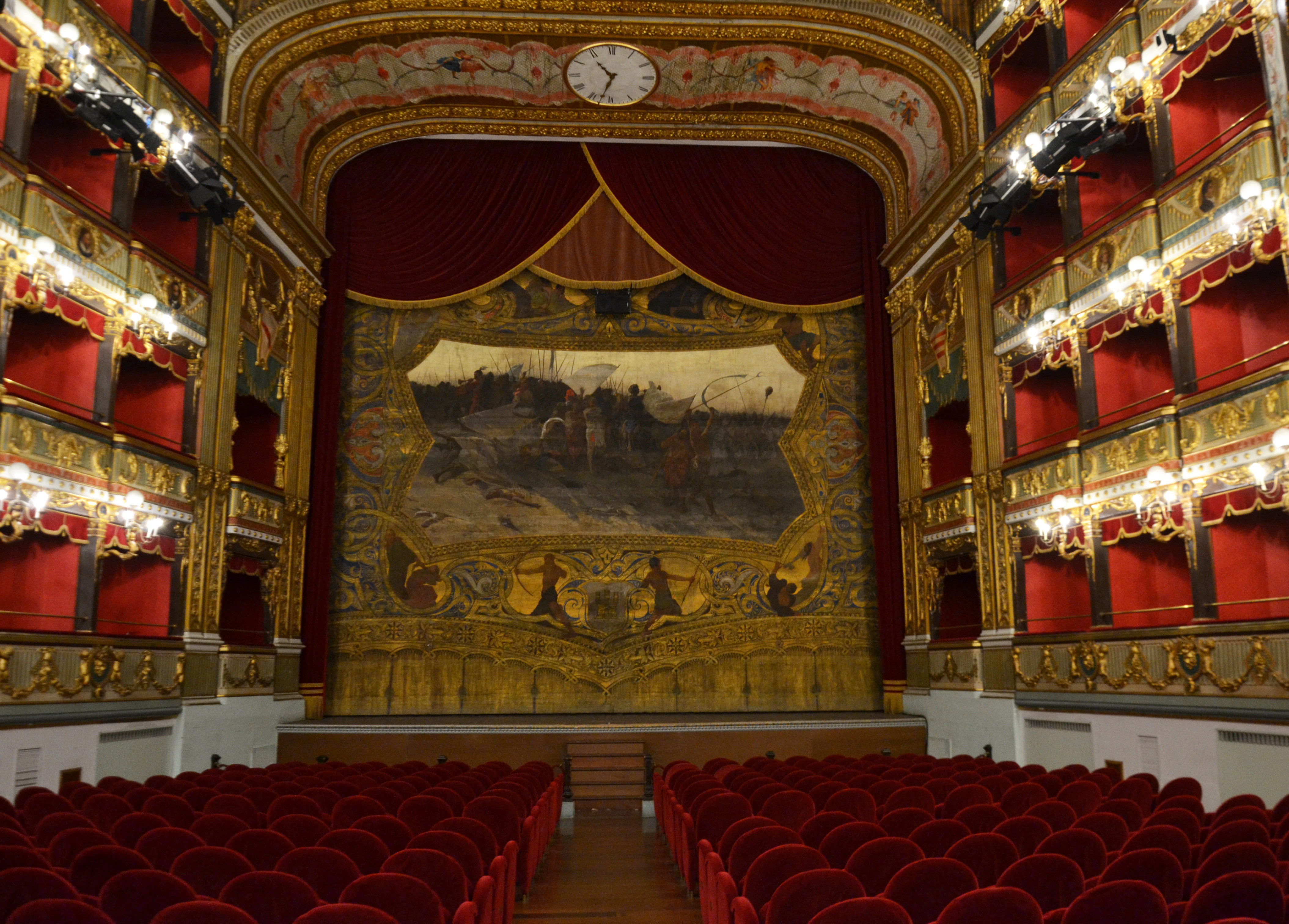 teatro Verdi Salerno